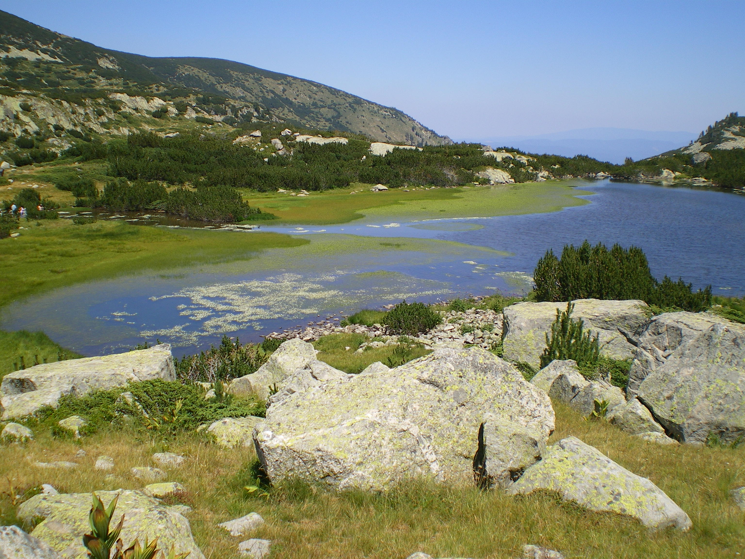 Popovi Ribni lakes 2, Pirin, Bulgaria